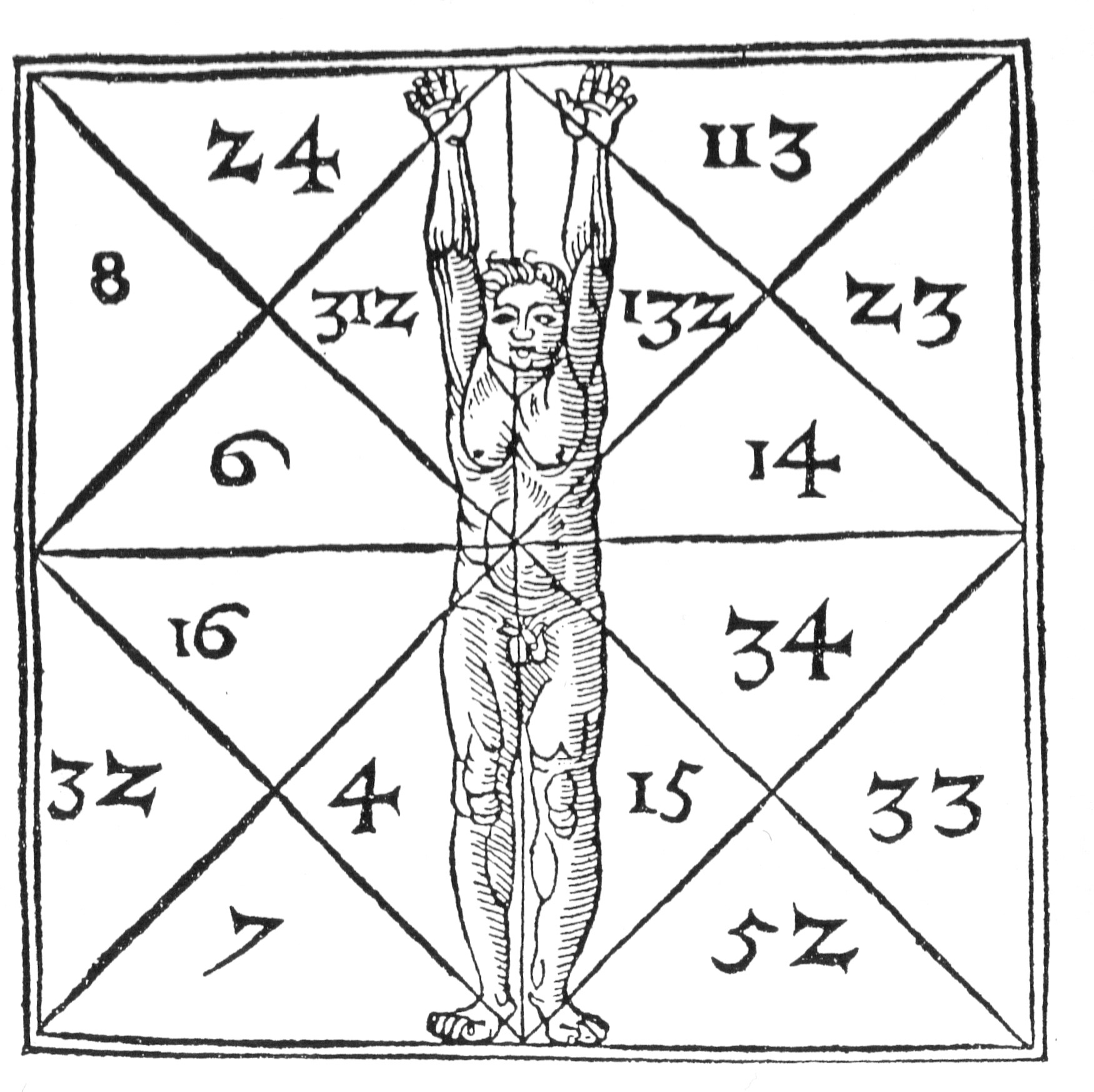 Die Proportionen des Menschen und ihre geheimen Zahlen, Abb. in Heinrich Cornelius Agrippa von Nettesheim: De Occulta Philosophia (1533 verlegt zu Köln).